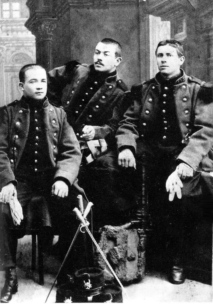 Jules Bonnot (do meio) posando para foto fardado, com dois outros soldados. Após deixar a carreira de militar e o exército francês, Bonnot futuramente se tornaria um grande anarquista expropriador membro do notório bando Bonnot.